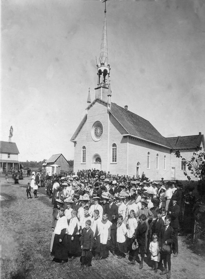 Bénédiction du pont, Notre-Dame-du-Laus, 1912